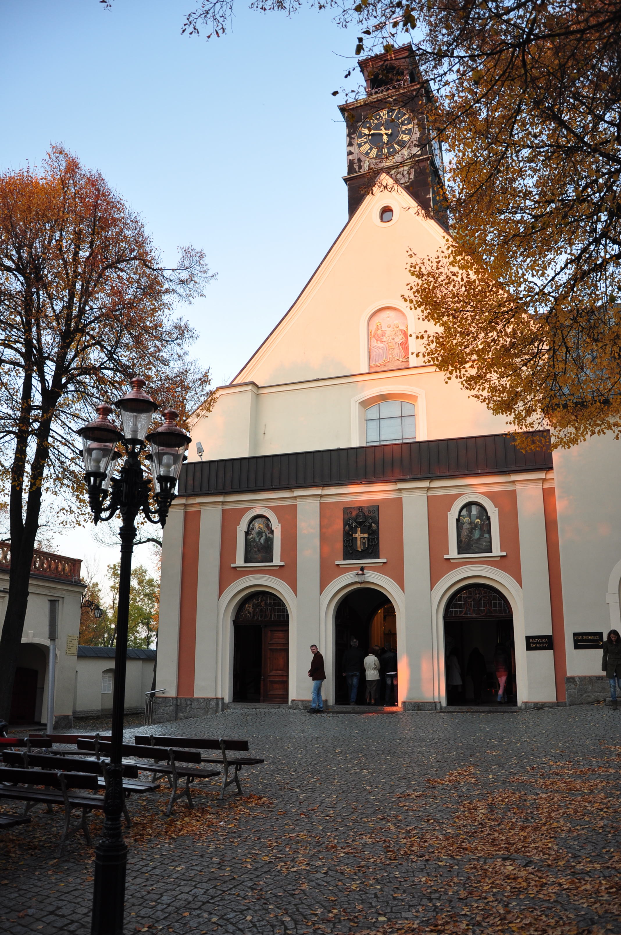 Góra Świętej Anny, kościół p.w. św. Anny, 1480, 1665, XVIII, XIX